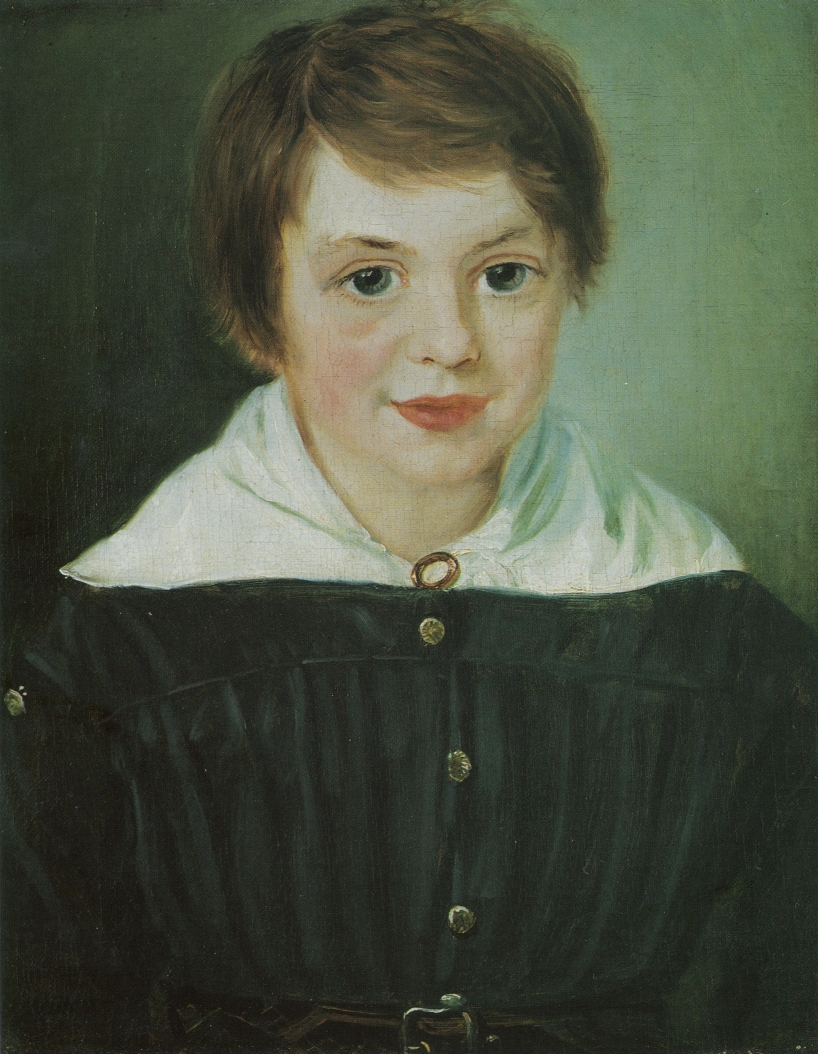 Portrait of Ludvig Ludvigsen Daae